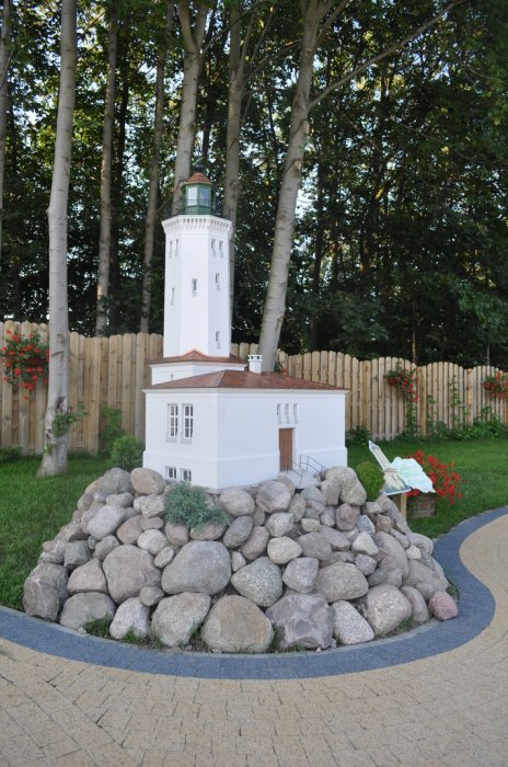 Latarnia Jastarnia-Bór